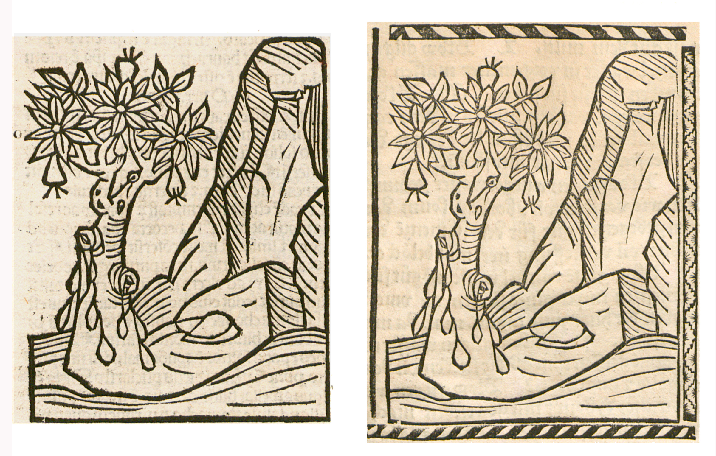 Abbildung von: Birken